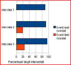 Grafico rappresentante i risultati del test effettuato dalla dottoressa E.Loftus sulle false memorie dell'infanzia.